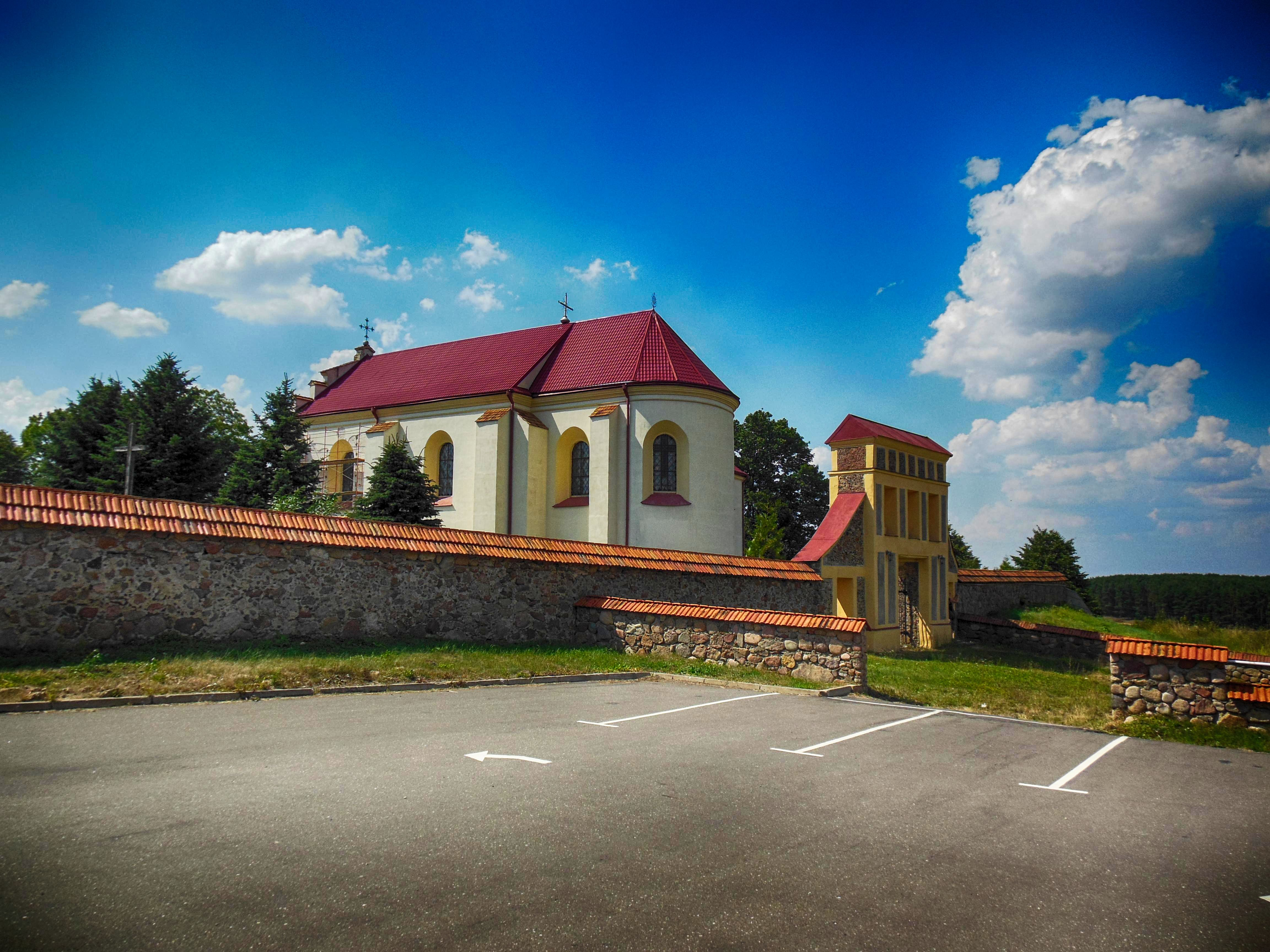 Беларуская (тарашкевіца): Касьцёл Сьв. Юрыя:дэкаратыўнае аздабленьне інтэр’ера касьцёла: галоўны алтар, бакавыя алтары, амбонуваходныя дзьверы надмагільны помнік Вольскіх. в. Крамяніца This is a photo of Belarusian heritage monument. Reference number: 412Г000273 ( WLM)